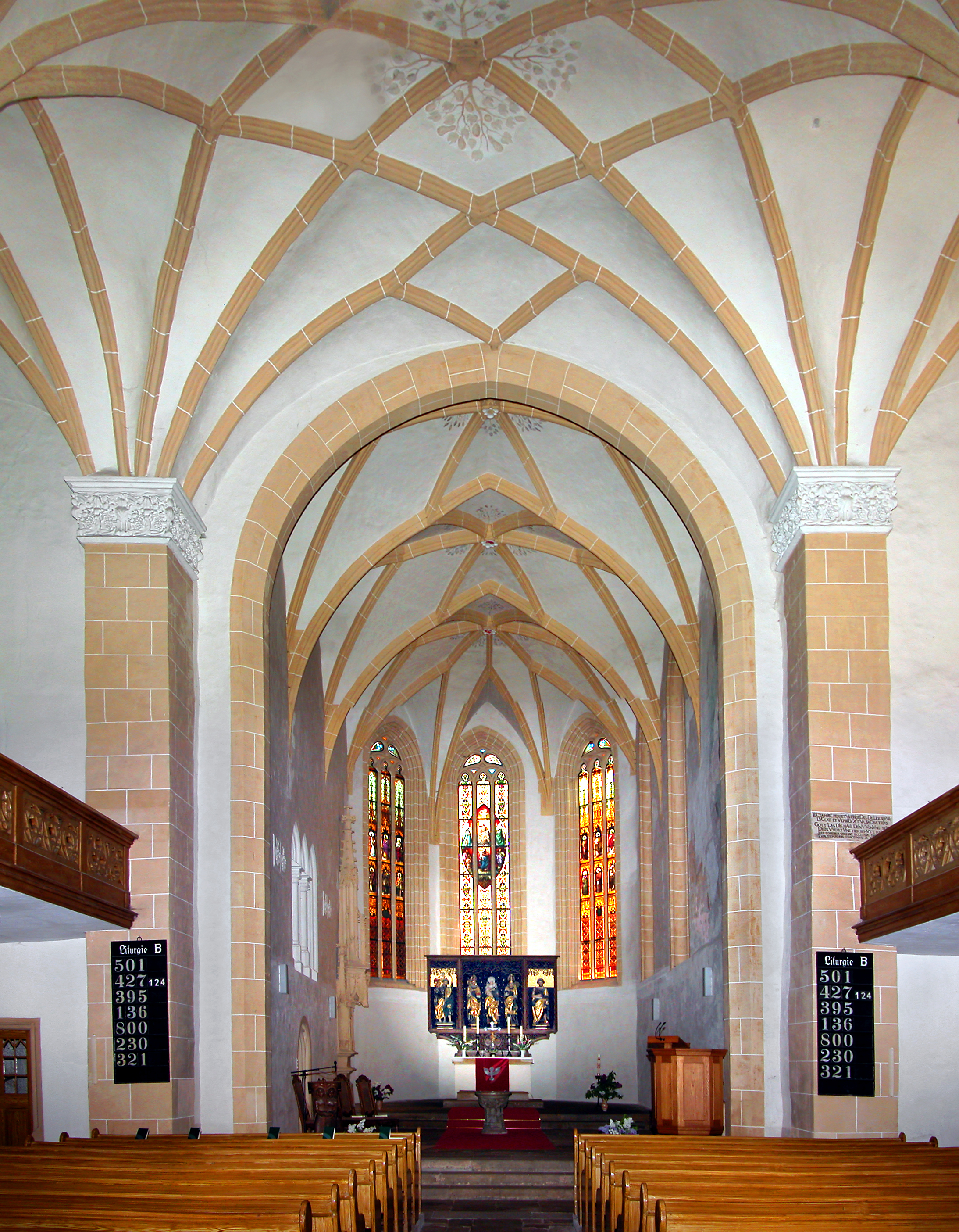 03.05.2009 04774 Dahlen (Sachsen), Kirchstraße (GMP: 51.364957,13.000966): Stadtkirche Unserer Lieben Frauen. Spätgotische Hallenkirche mit Netz- und Sterngewölben. Chor nach 1475. Spätgotische Schnitzfiguren um 1520 vom Meister des Döbelner Hochaltars, im Altarschrein von 1863 aufgestellt.[DSCN37122-37124.TIF]20090503177MDR.JPG(c)Blobelt